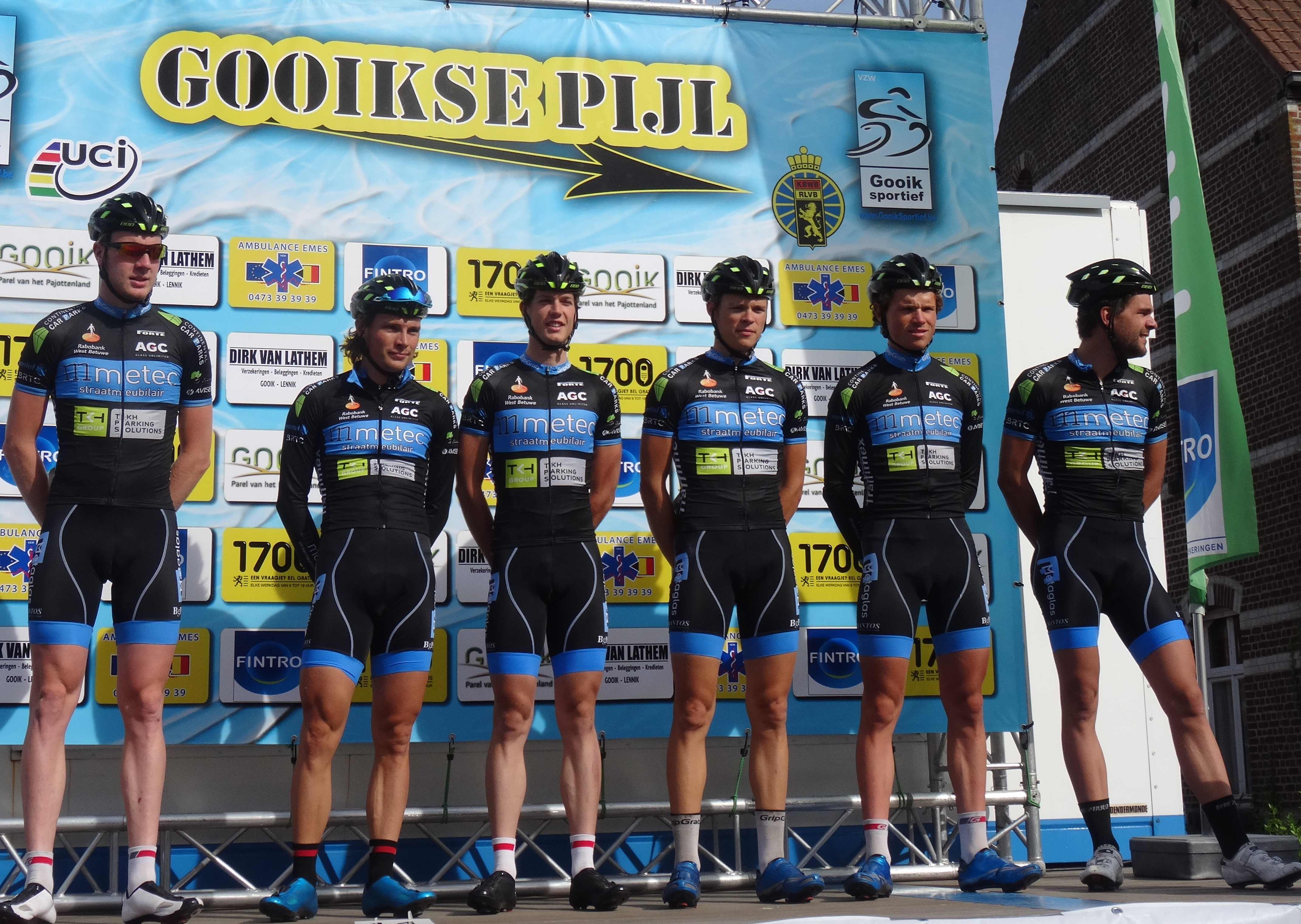 Reportage réalisé le dimanche 28 septembre à l'occasion du départ et de l'arrivée de la Gooikse Pijl 2014 à Gooik, Belgique.